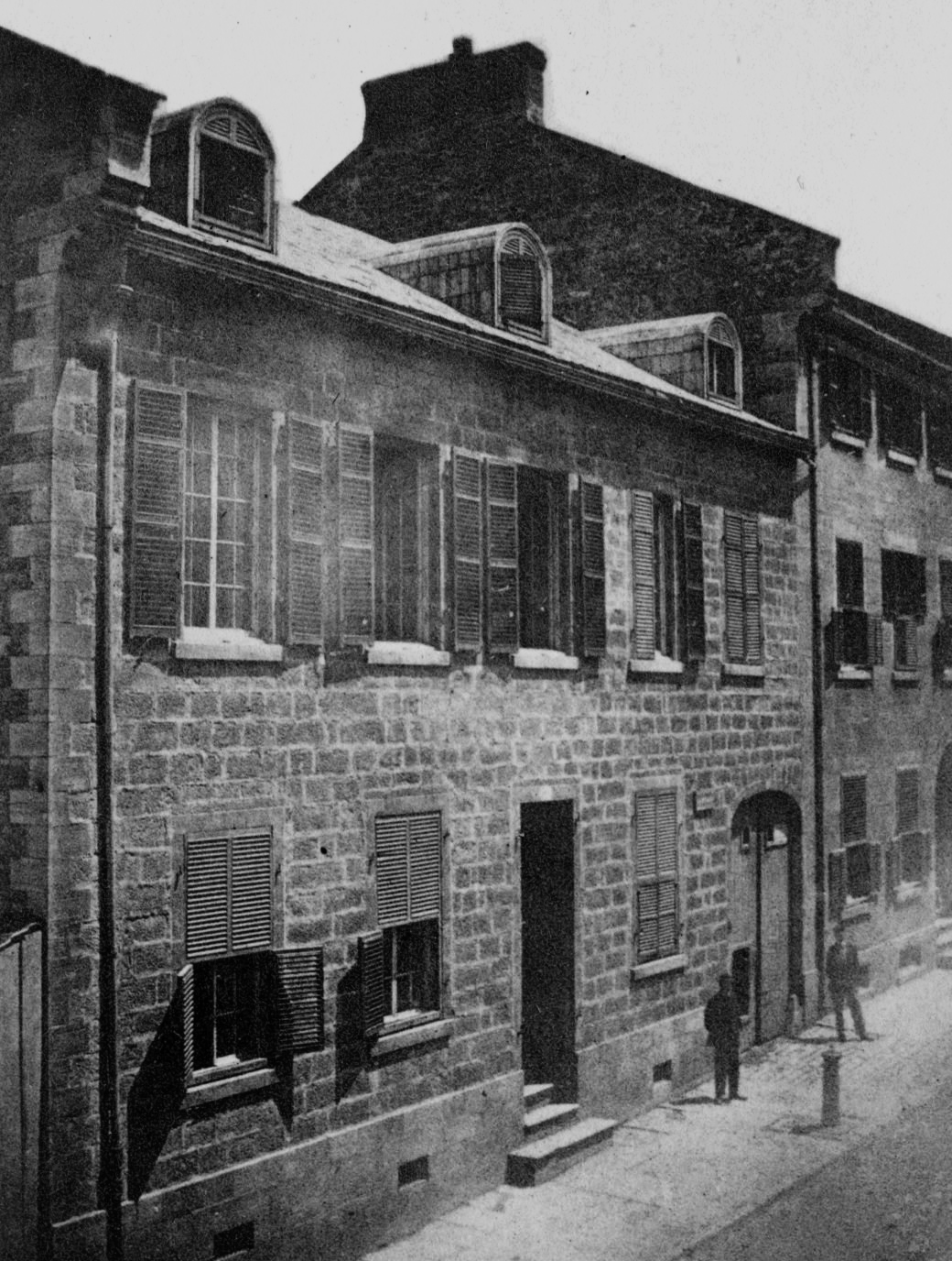 Maison Robert Nelson, rue Saint-Gabriel à Montréal, démolie après la prise de vue / Bazinet